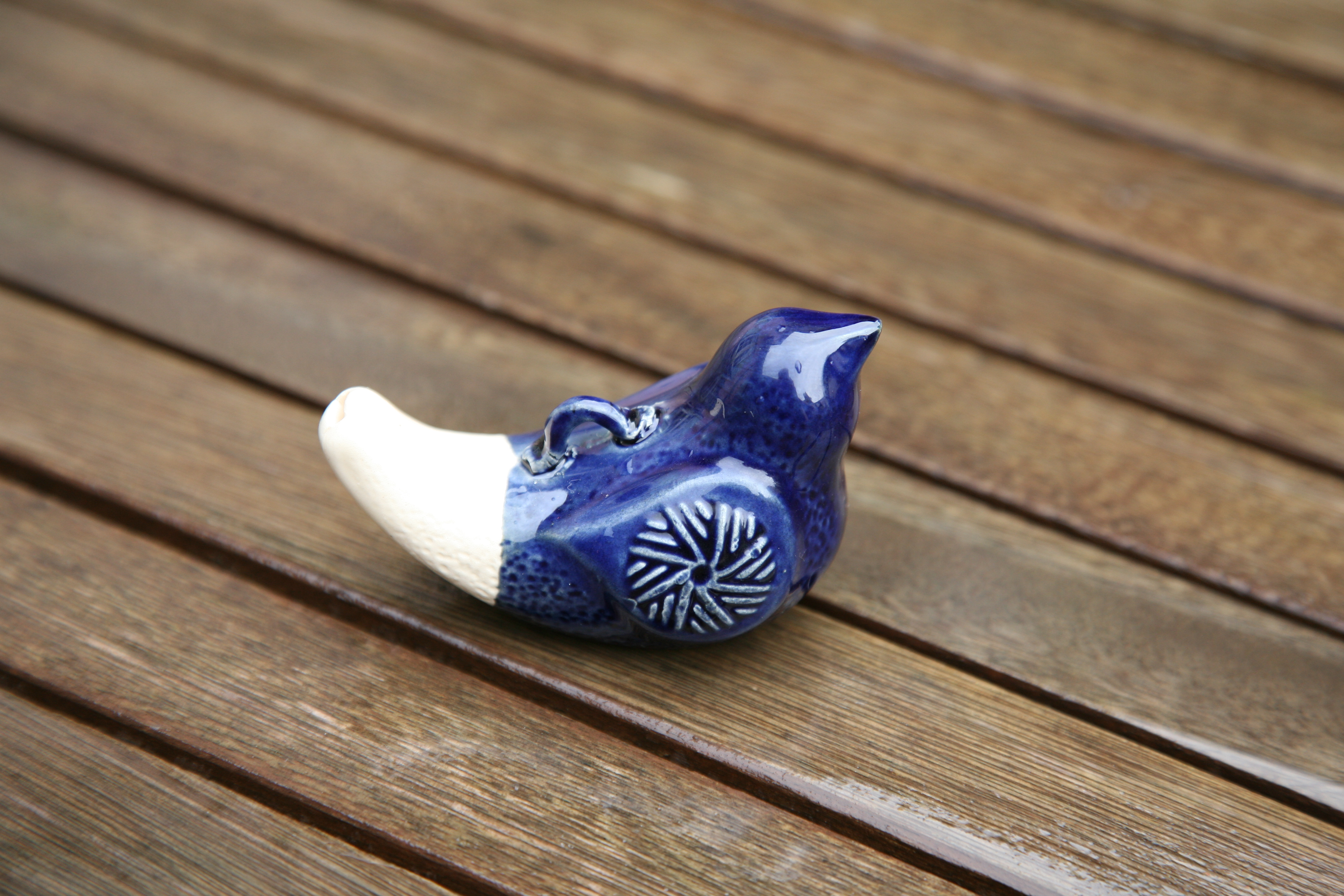 Savipiilu ehk pardipill ehk savipill, Leedu keraamikute taies, eesti rahvapill.